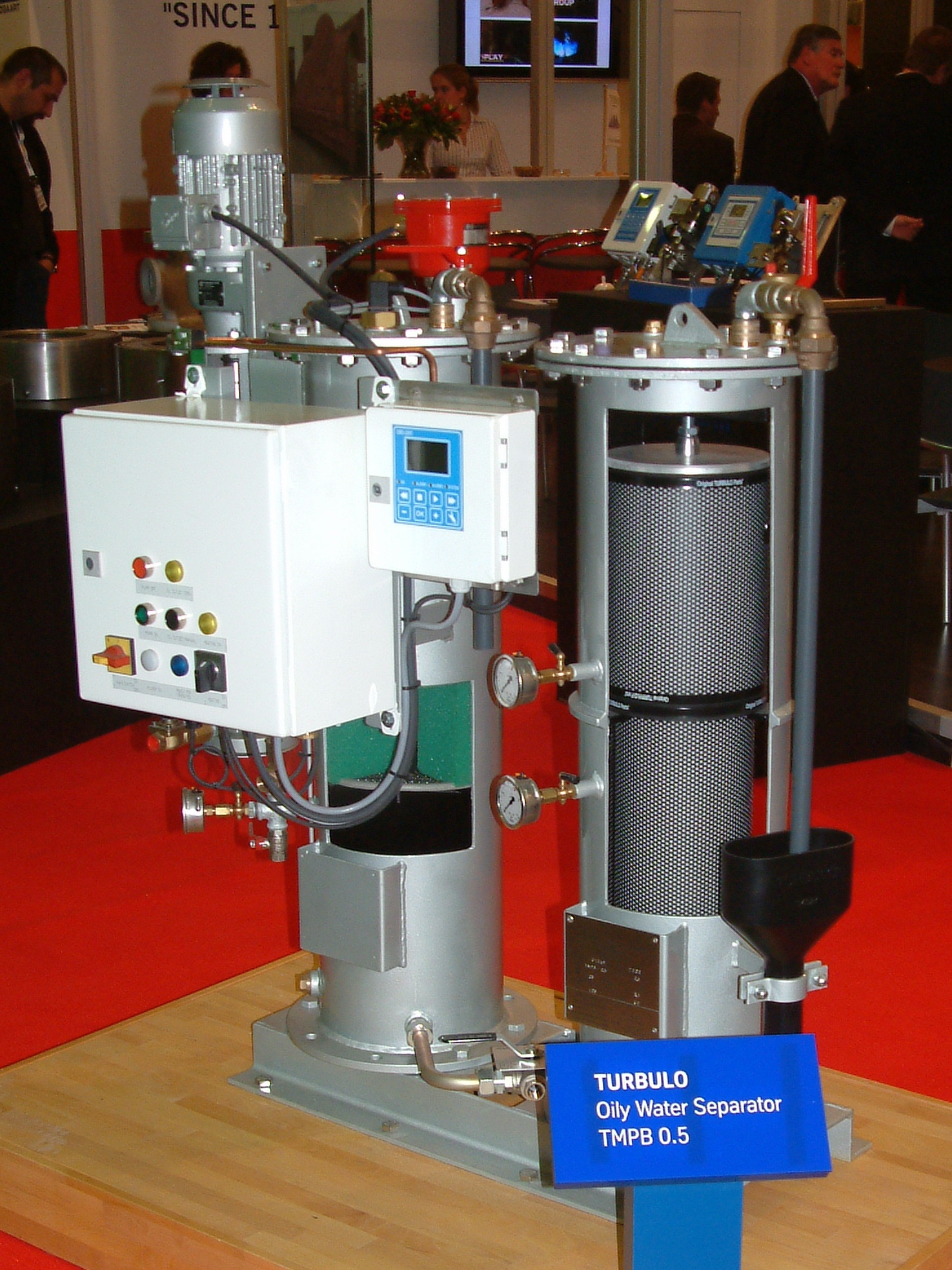 Europort 2009